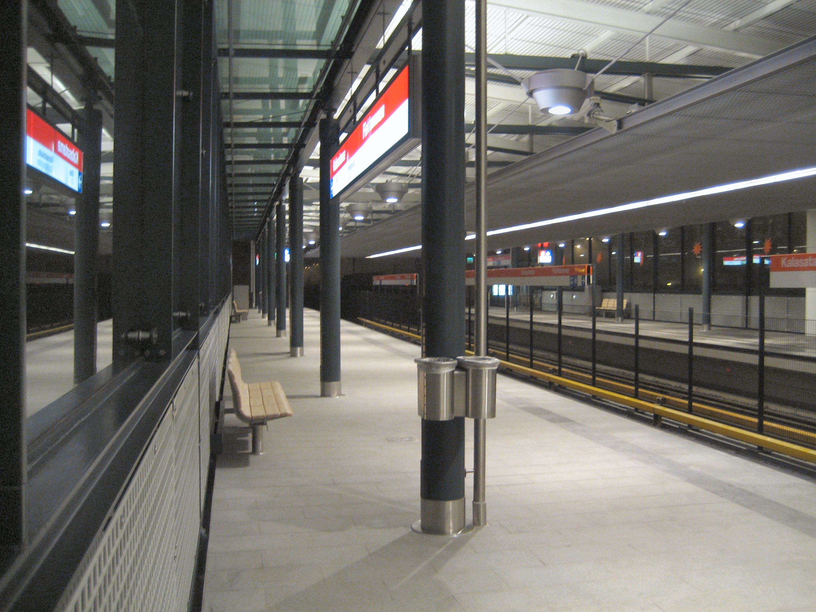 Kalasatama metro station